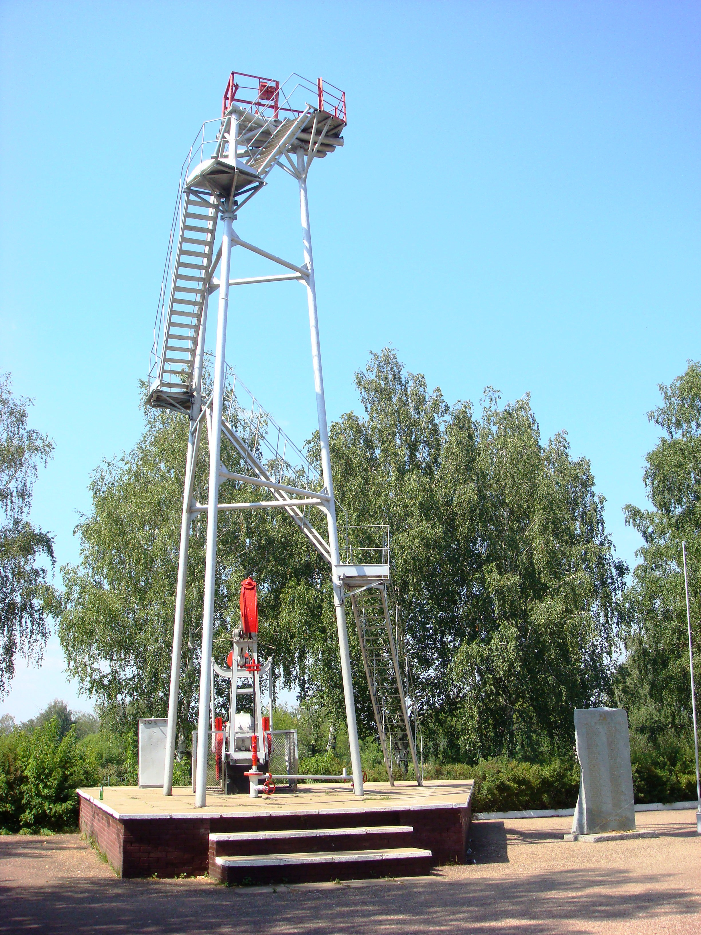 Скважина №702